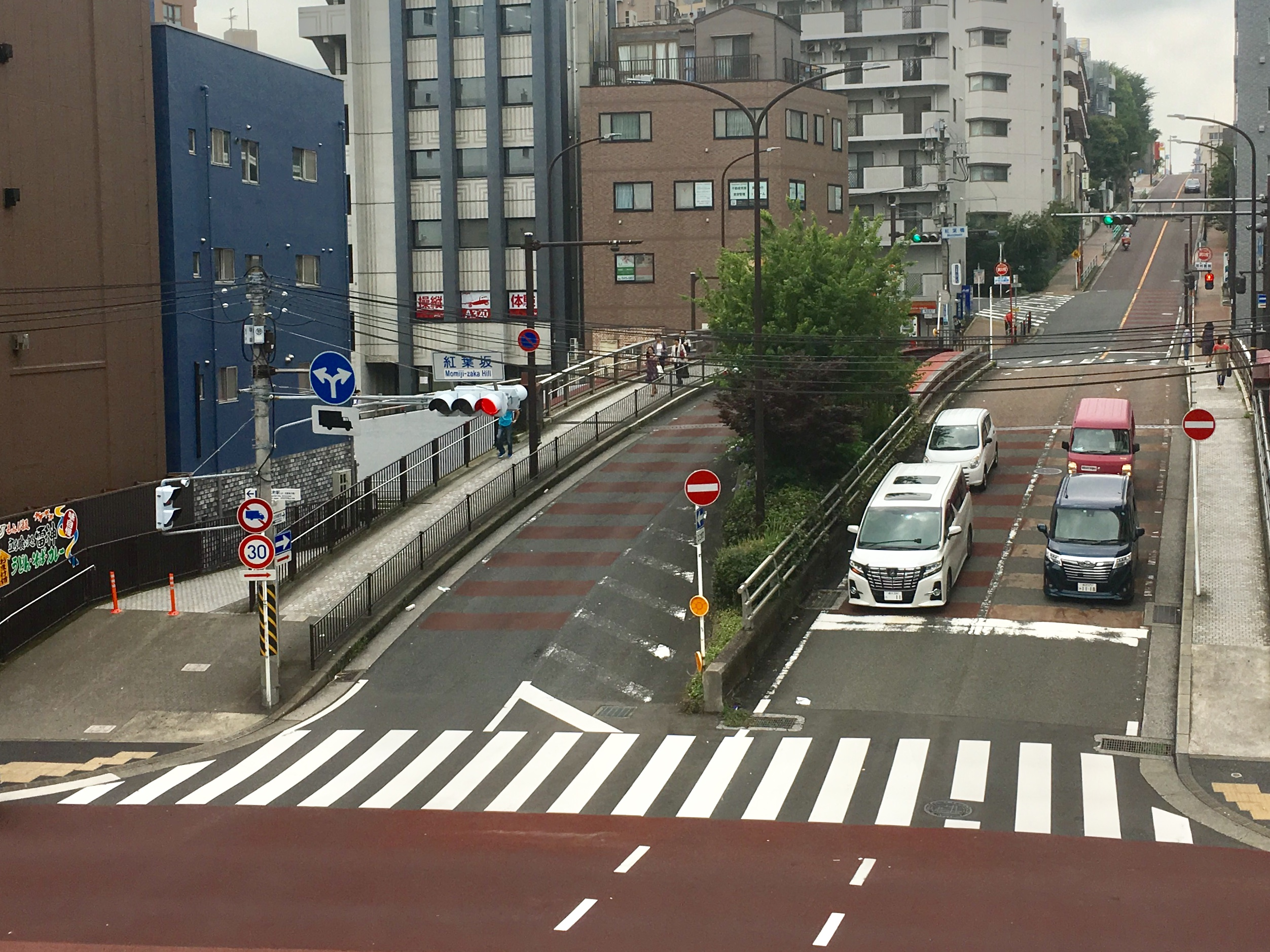 2019年7月16日に桜木町駅西口広場付近から紅葉坂交差点まで一部区間（延長約140m）が先行開通した東横線跡地の歩行者専用道路（遊歩道）に架けられている「みなとみらい4号橋」より、下部の紅葉坂交差点を見る。